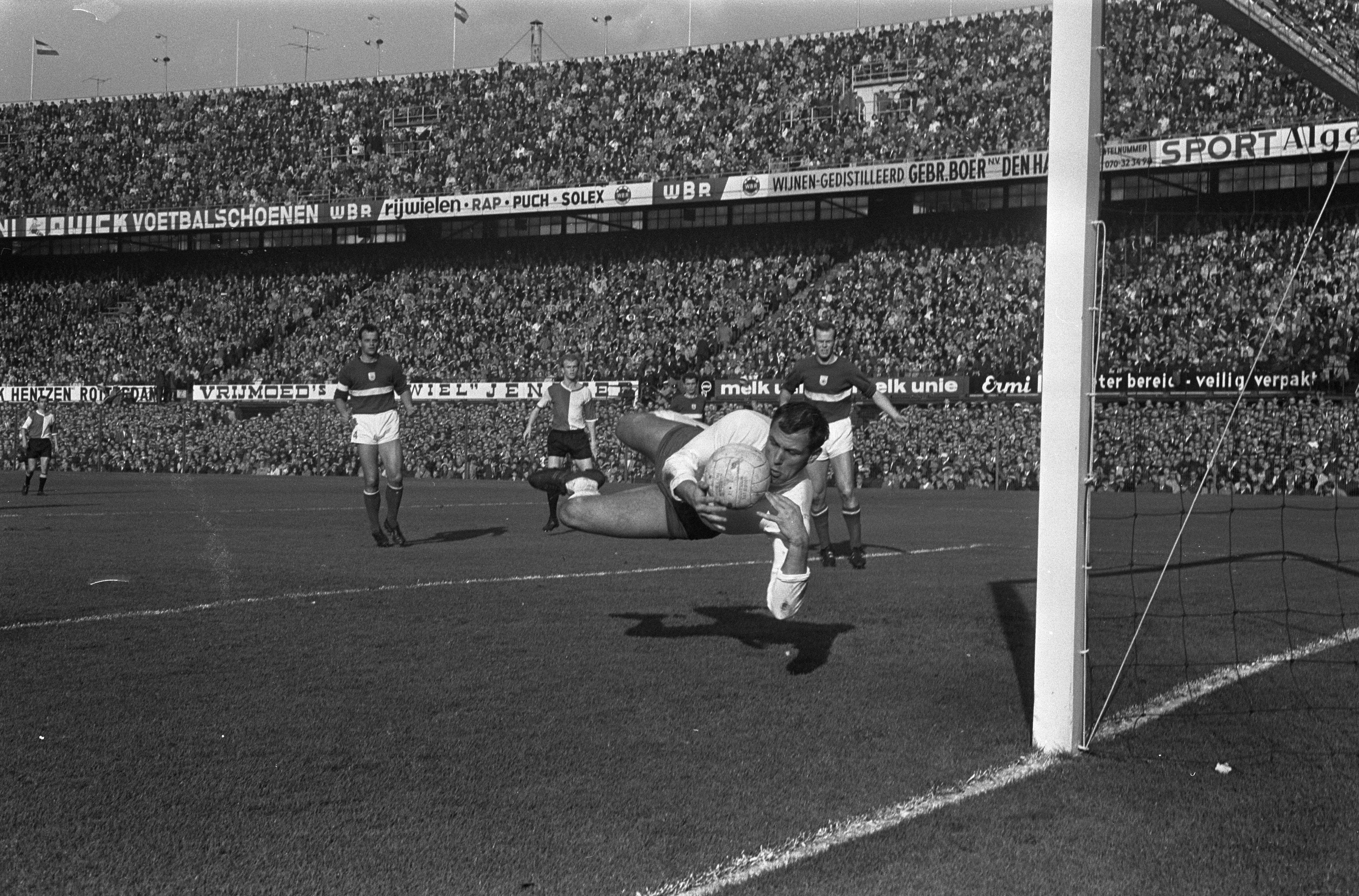 Collectie / Archief : Fotocollectie Anefo Reportage / Serie : [ onbekend ] Beschrijving : Feyenoord tegen GVAV 0-0. Tonny van Leeuwen in aktie, links Geels, rechts Koeman Datum : 22 oktober 1967 Trefwoorden : keepers, sport, voetbal Persoonsnaam : Koeman Instellingsnaam : Feyenoord Fotograaf : Koch, Eric / Anefo Auteursrechthebbende : Nationaal Archief Materiaalsoort : Negatief (zwart/wit) Nummer archiefinventaris : bekijk toegang 2.24.01.05 Bestanddeelnummer : 920-8028